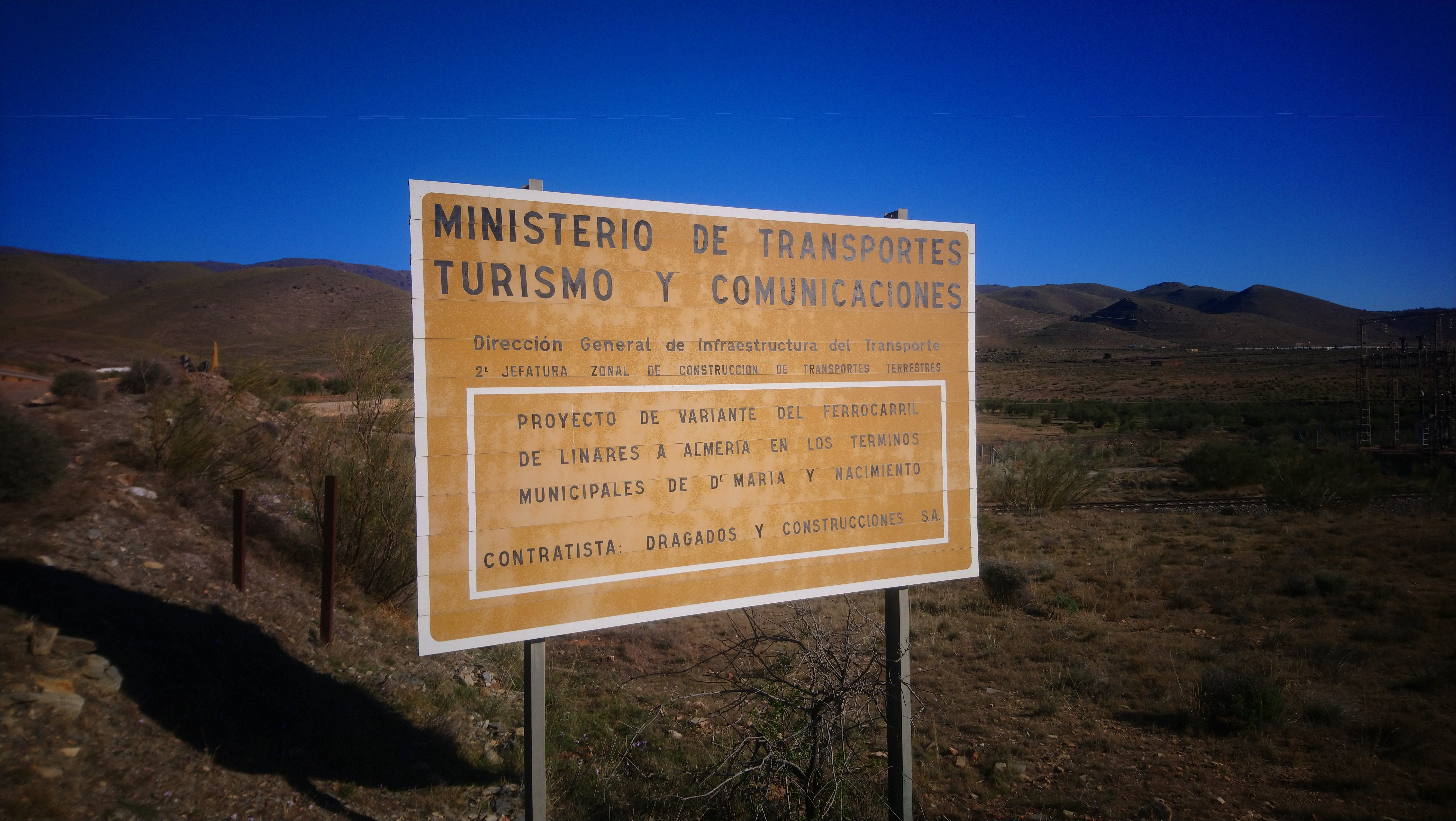 Cartel de las obras de enderezamiento de vías que dejó en desuso la estación de Nacimiento.